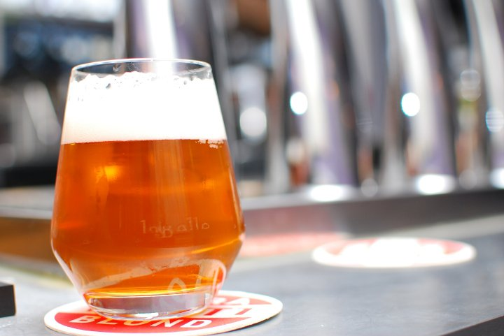 biere bar